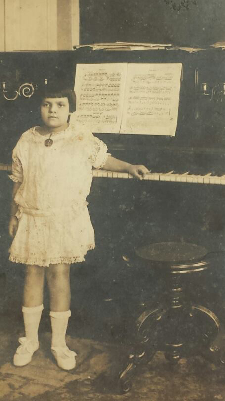 Pianista Maria Antônia de Castro enquanto criança ao piano